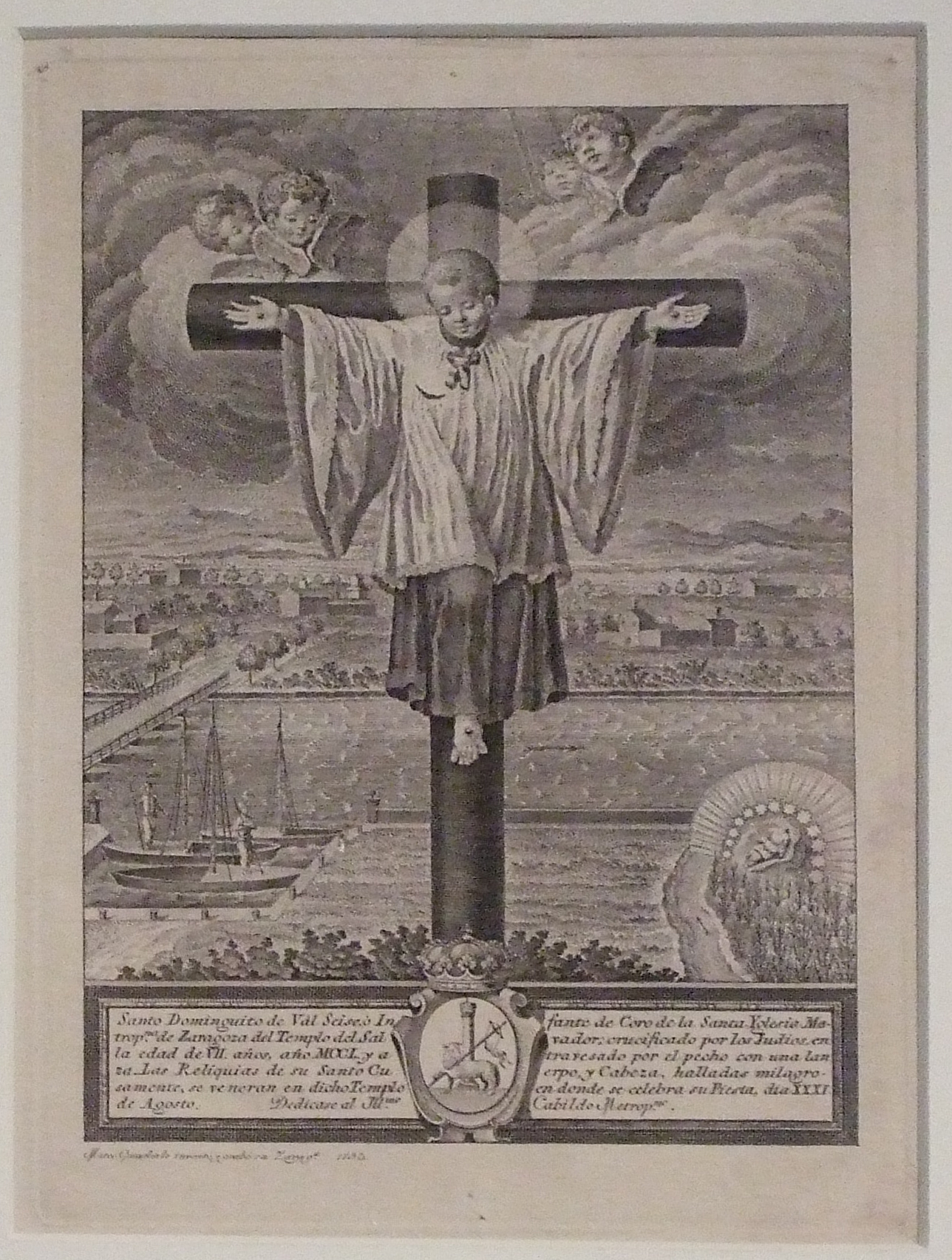 Grabado que representa a Santo Dominguito de Val (1793), obra de Mateo Gonzalez. Actualmente en el Museo de Zaragoza.